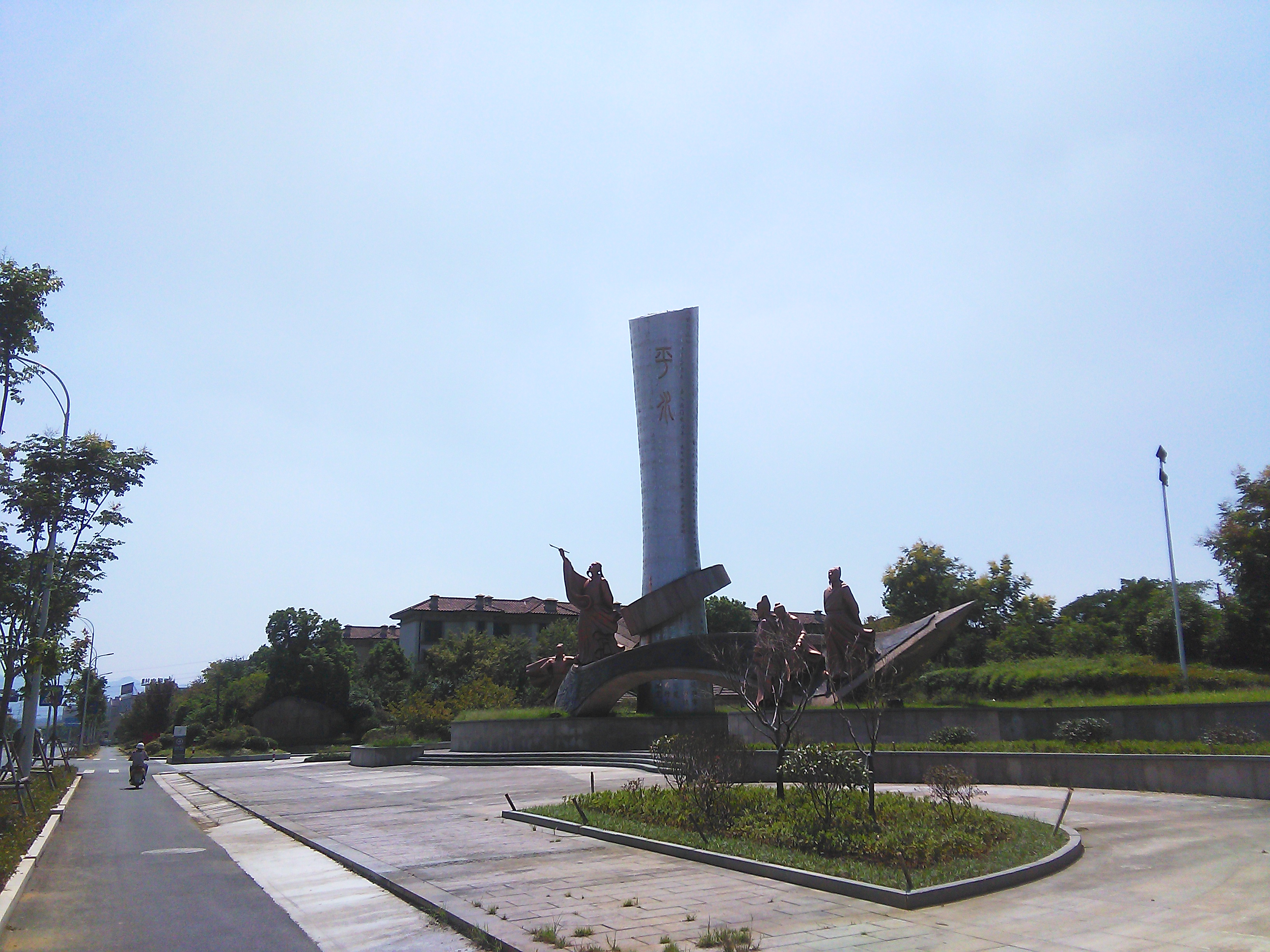 中文（中国大陆）: 平水街头雕塑，宛委山麓